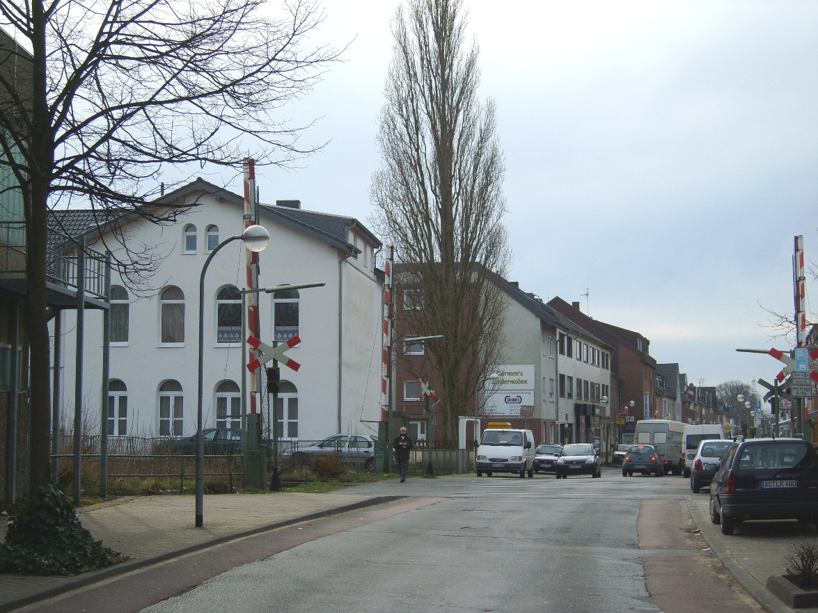 Ehemaliger Bahnhof Mariadorf an der Ringbahn Herzogenrath–Alsdorf–Stolberg zwischen Mariadorf und Blumenrath (Stadtteile von Alsdorf)